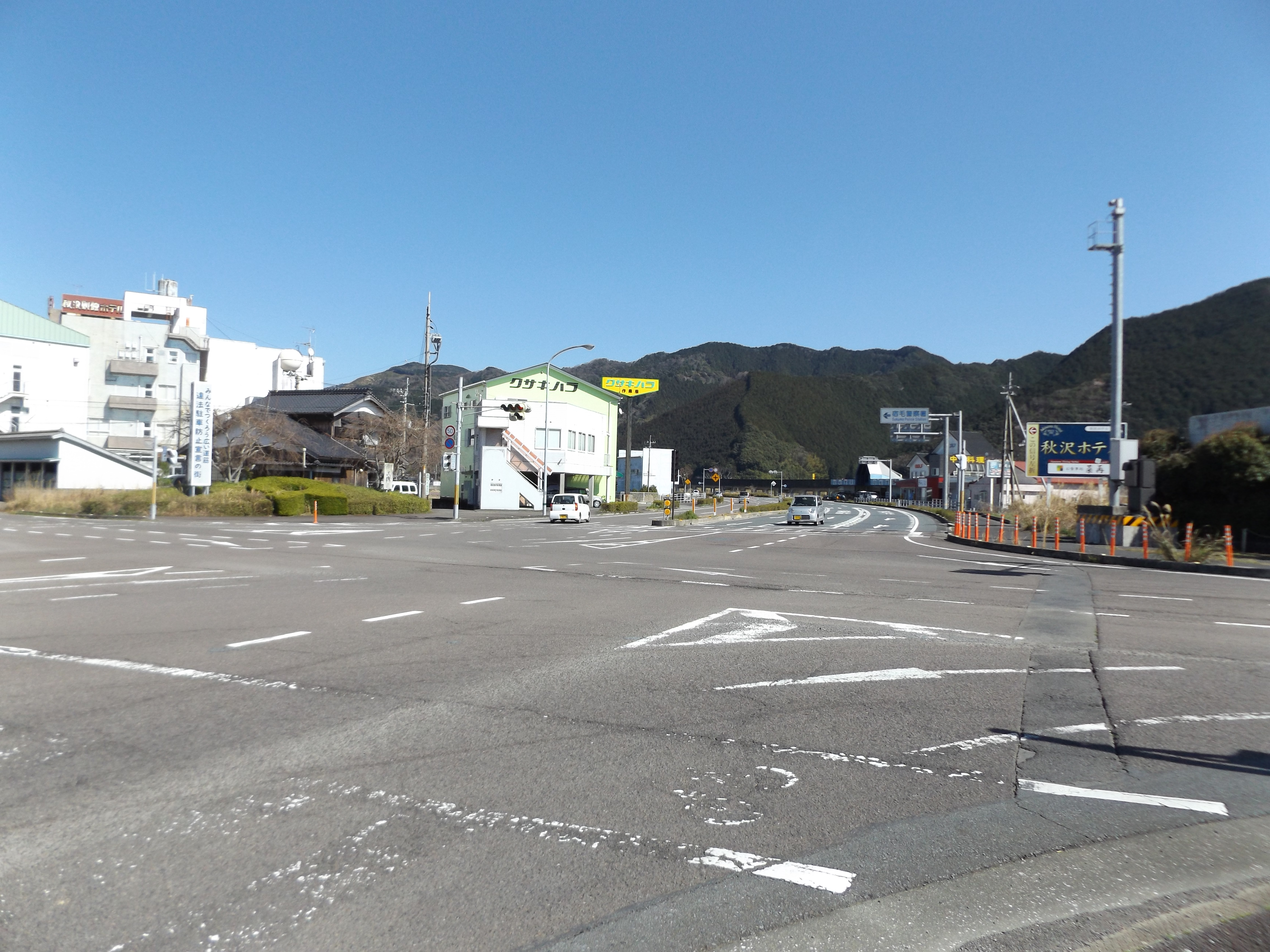 高知県宿毛市にある国道56号（国道320号が重複）と国道321号の交差点。国道320号はここが起点、国道321号はここが終点である。